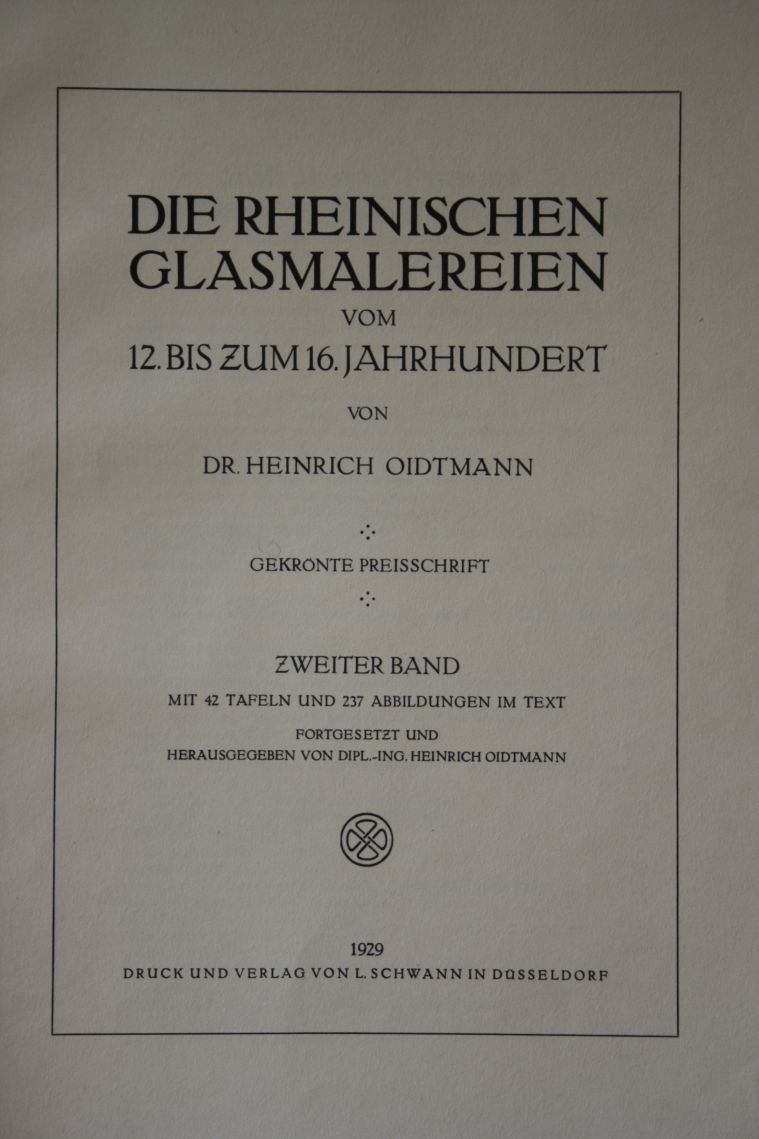 Titelbatt des Buches von Heinrich Oidtamnn: Die rheinischen Glasmalereien vom 12. bis zum 16. Jahrhundert. Bd. 2, Schwann Verlag, Düsseldorf 1929